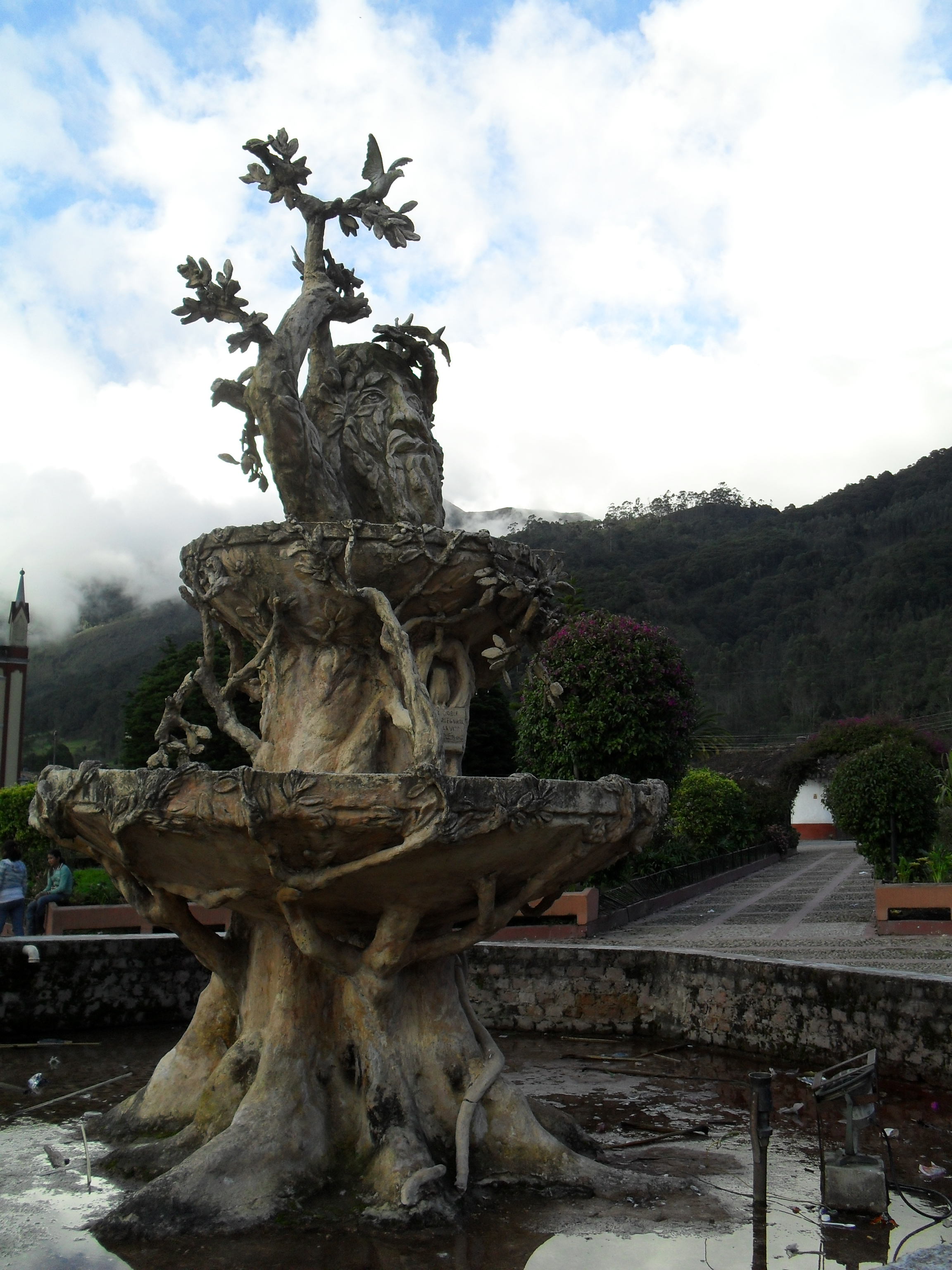 Monumento al roble en Arcabuco, Boyacá, Colombia